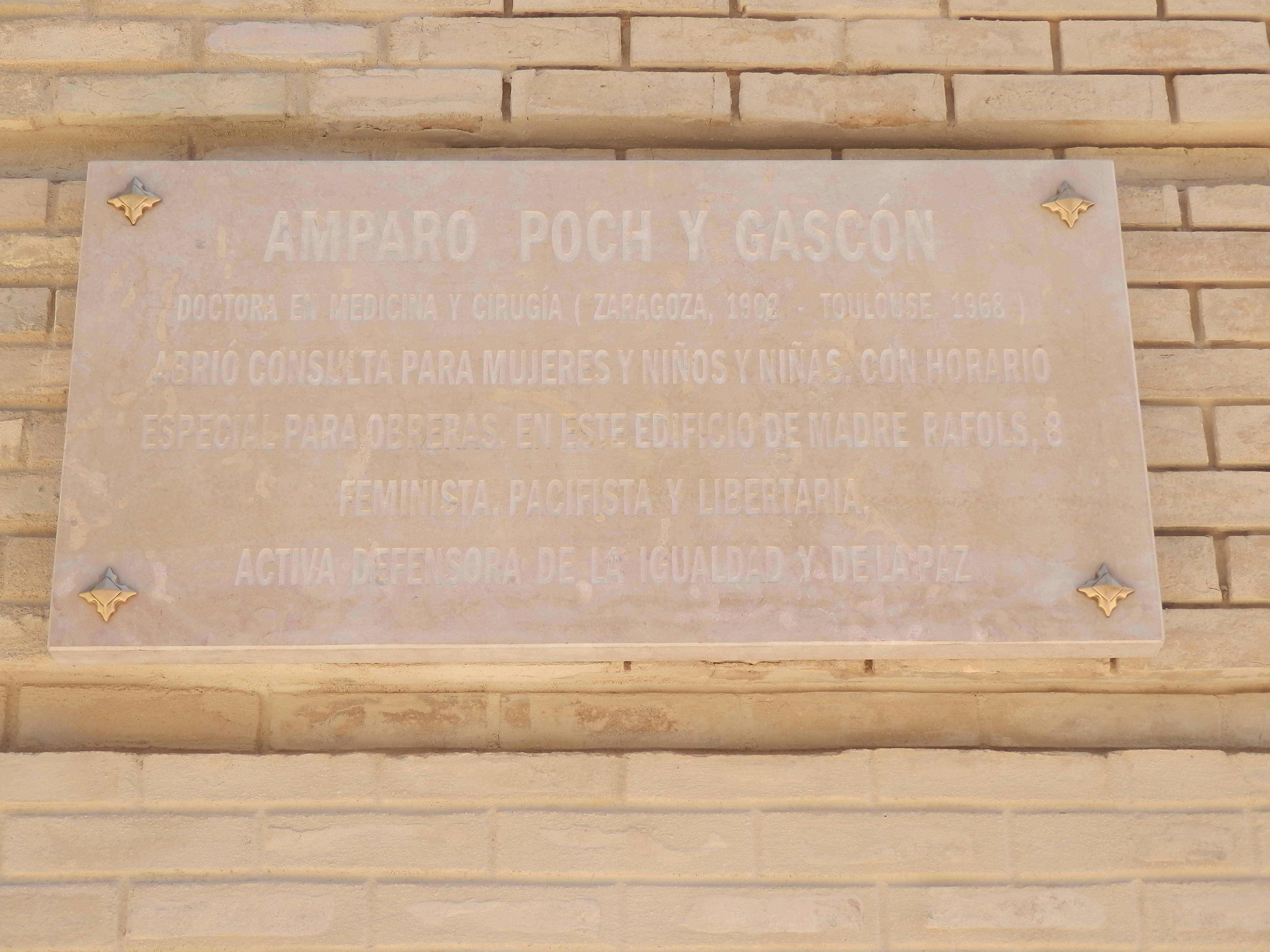 Casa en la calle Madre Rafols, 8. Amparo Poch vivió en esta casa desde 1916. En una habitación interior estableció su consulta médica en 1929.